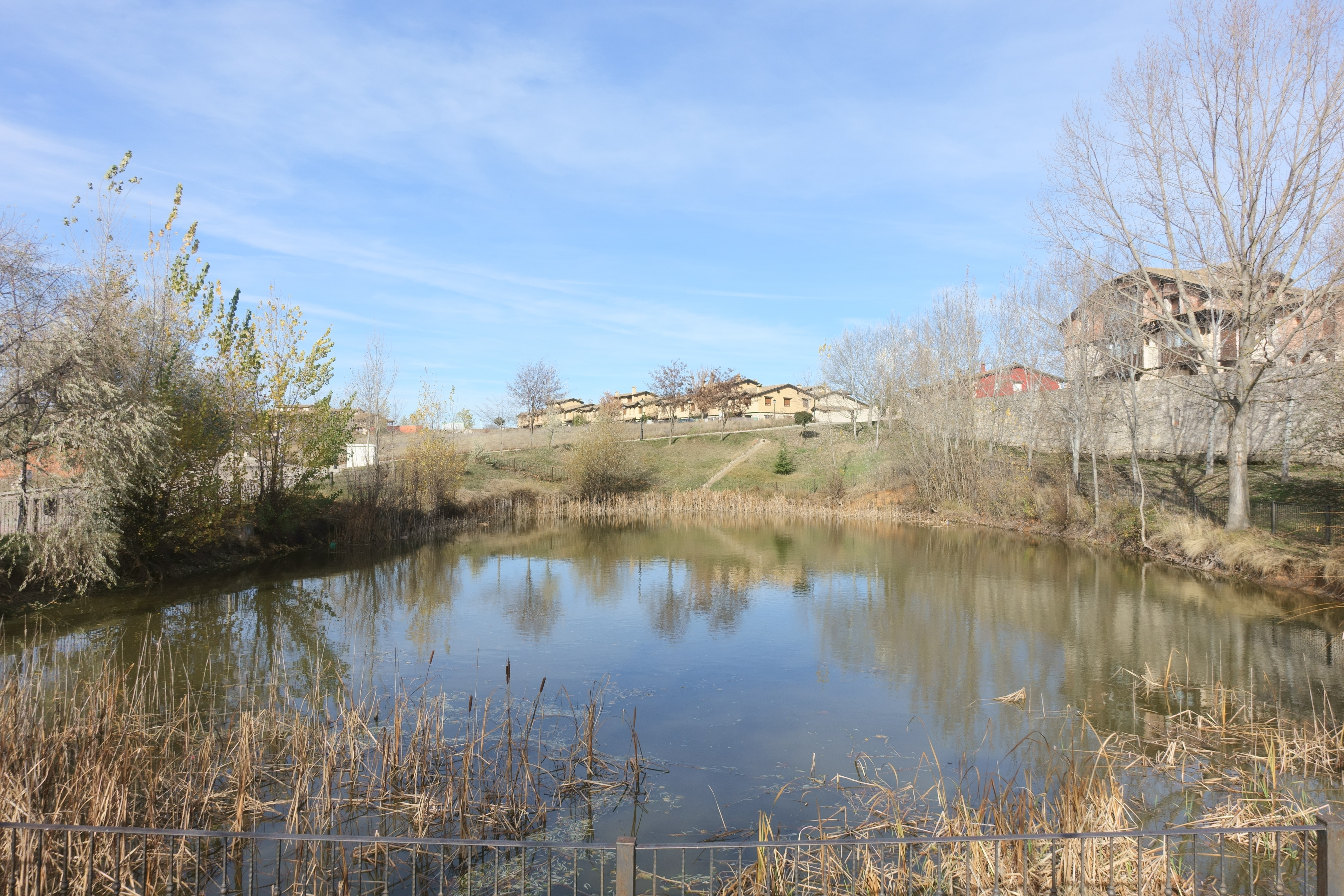 Laguna de la Poza, en Grajera (Segovia, España).